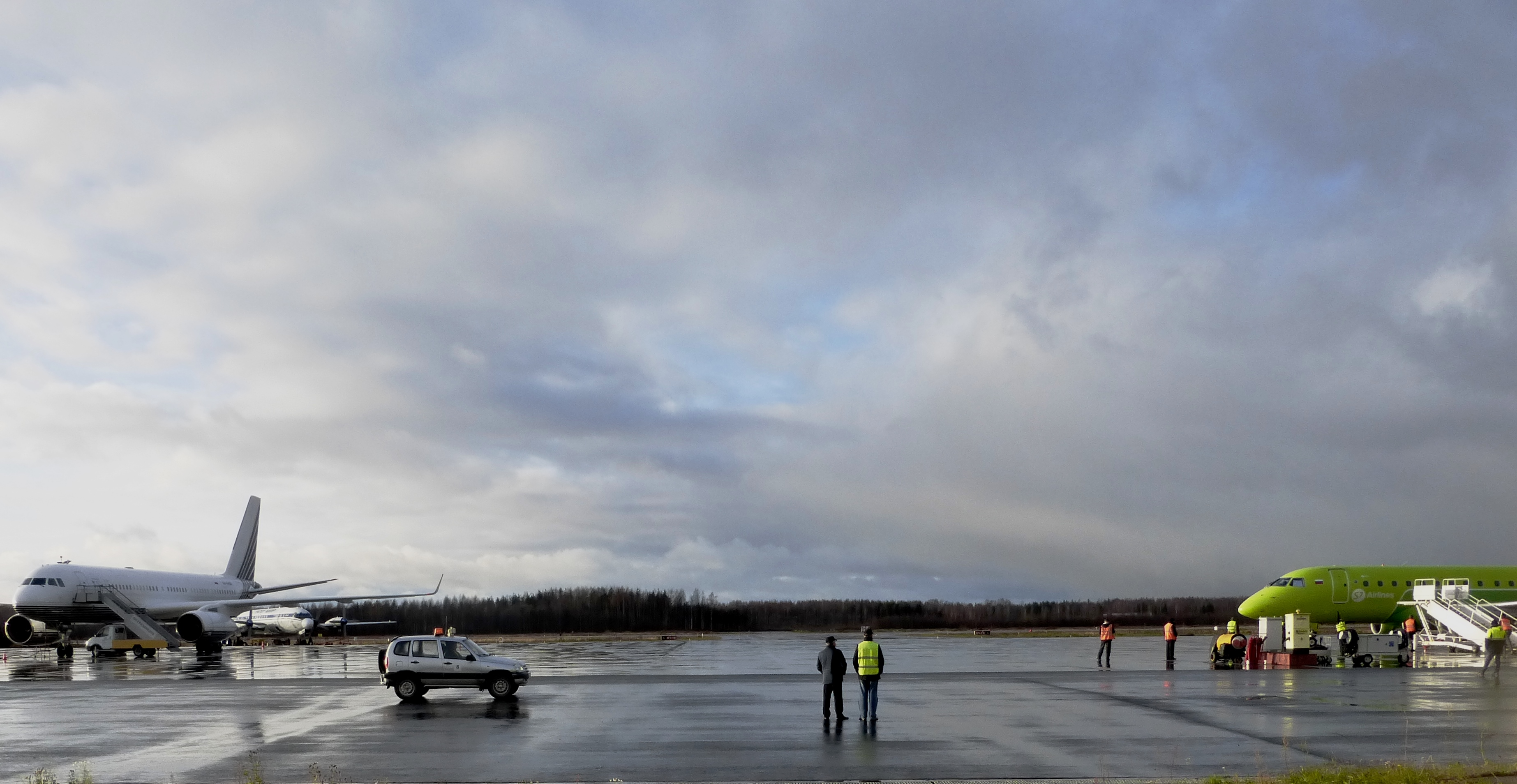 Аэропорт "Петрозаводск" (Бесовец, Карелия)